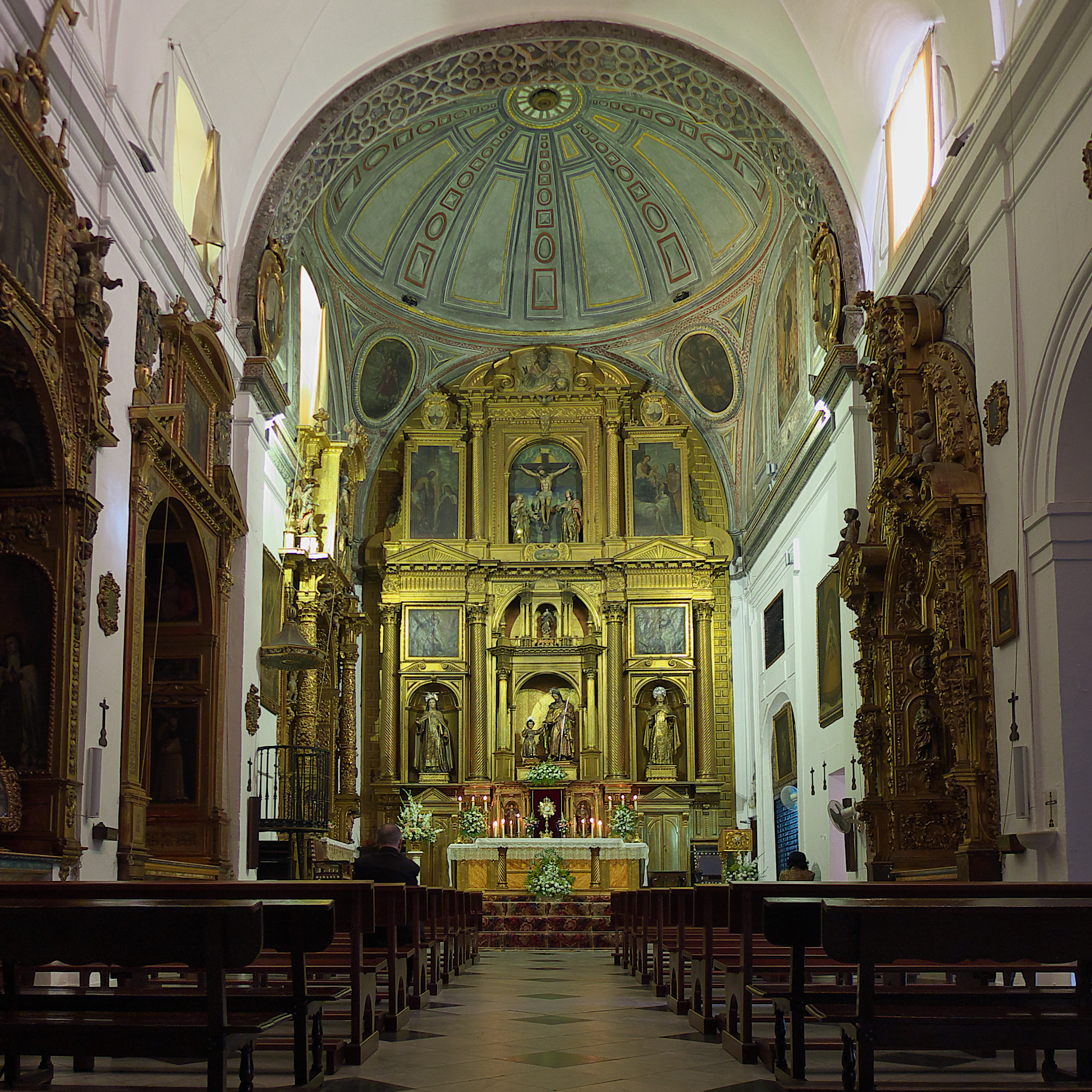 Santa Teresa de Jesús funda un convento de carmelitas en Sevilla (1575). A principios del siglo XVII se construye el actual, atribuido a Vermondo Resta. El retablo mayor es de Jerónimo Velázquez (1630), siendo dorado por Pablo Legot